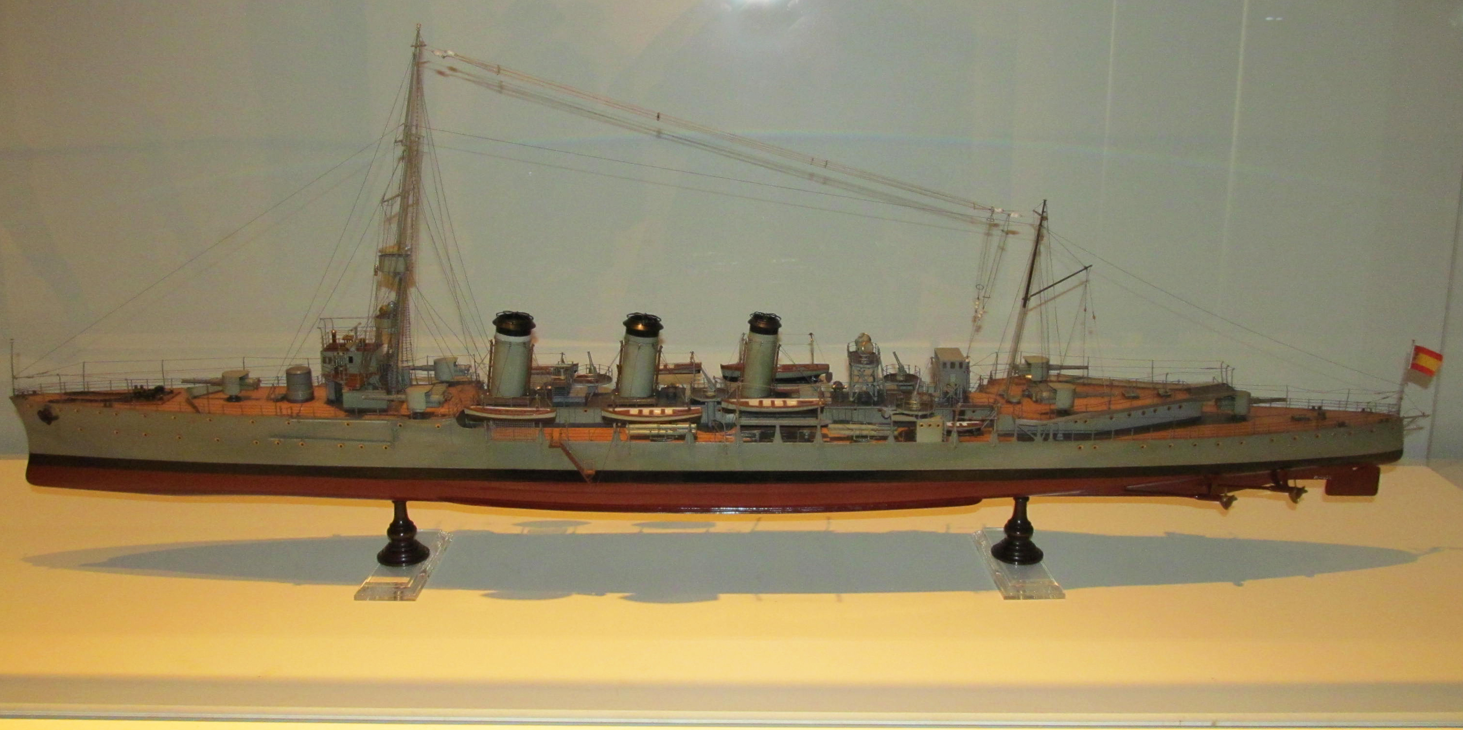 Modèle du croiseur Blas de Lezo, 1923-1932; Métal et bois paint au Museo Naval, Madrid.